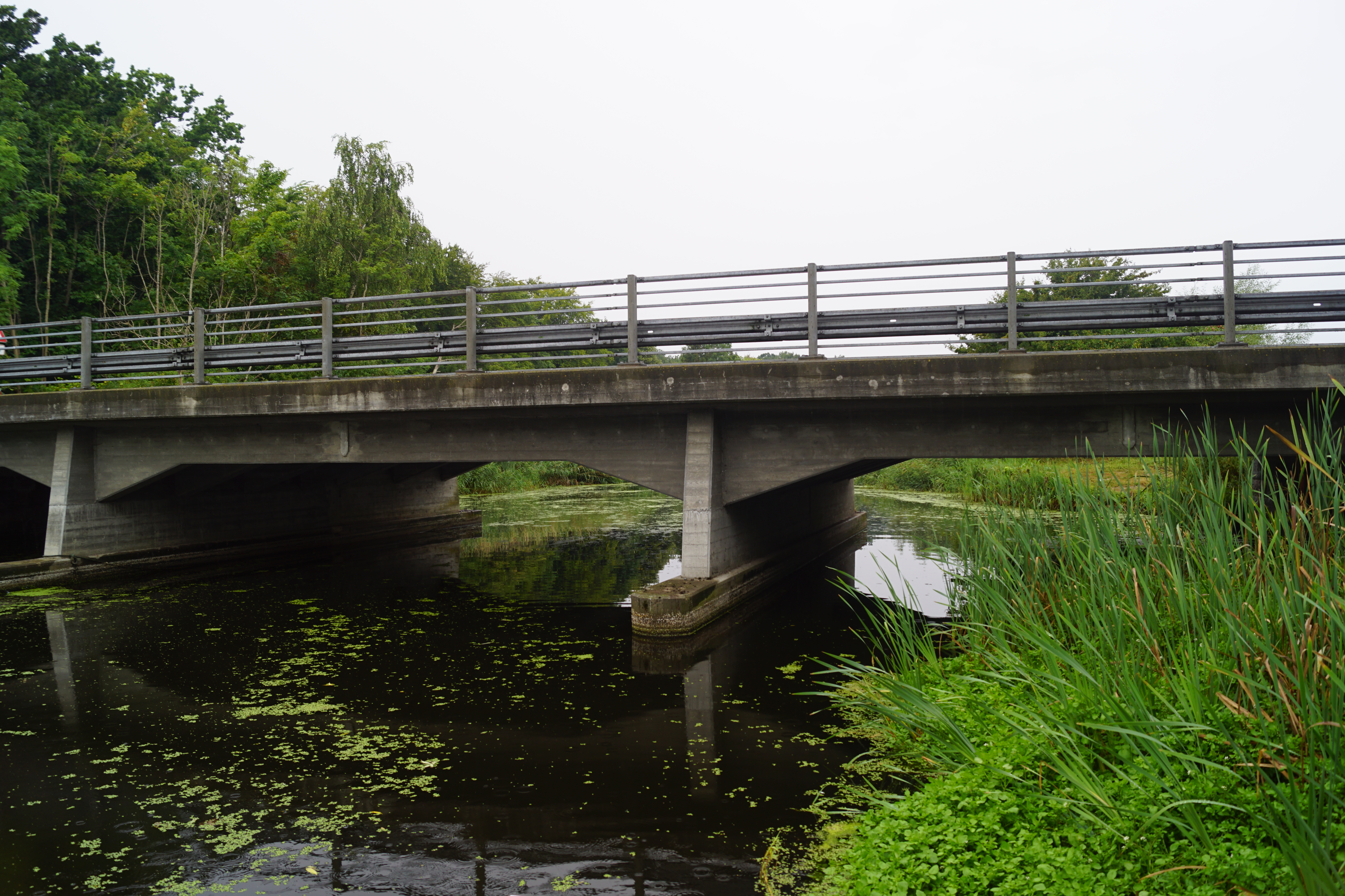 Prambro, Tryggevælde Å set mod nord